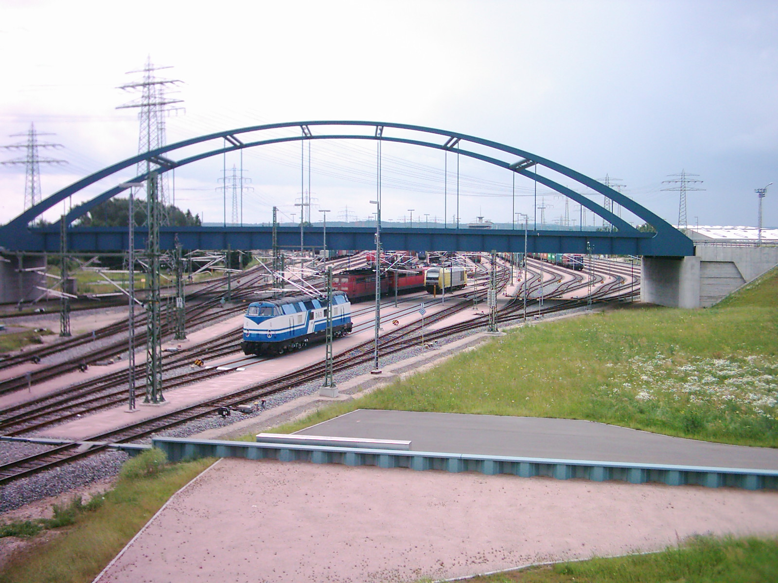 Blick von der Finkenwerder Straße auf den Hafenbahnhof Alte Süderelbe.